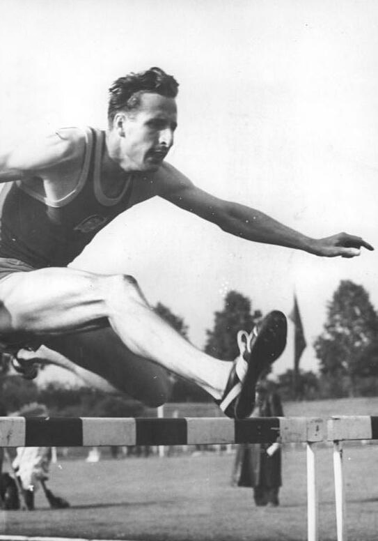 Hans Dittner Zentralbild Wlocka 22.7.1956 VII. DDR-Leichtathletik-Meisterschaften in Erfurt In der Zeit vom 20. bis zum 22. Juli 1956 werden in Erfurt die VII. Leichtathletik-Meisterschaften der DDR ausgetragen. UBz: Im 400-m-Hürdenlauf siegte der DDR-Rekordhalter Dittner in der neuen deutschen Jahresbestleistung von 52,2 Sek.